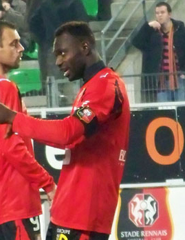 Match de Foot Rennes - Lorient, 23 Février 2008, Ligue 1 Saison 2007-2008. De gauche à droite : Rod Fanni, Mickaël Pagis, John Mensah et Petter Hansson